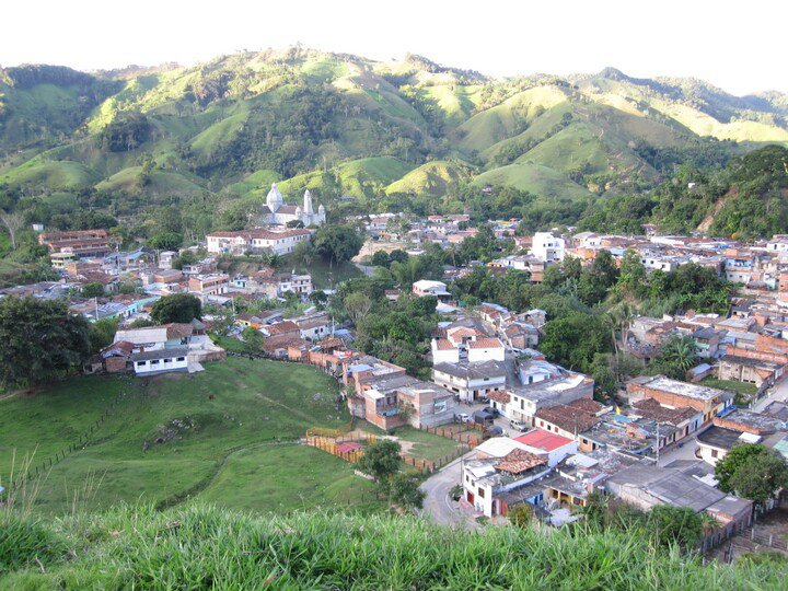 Caracoli, Antrioquia. Sector del Parque